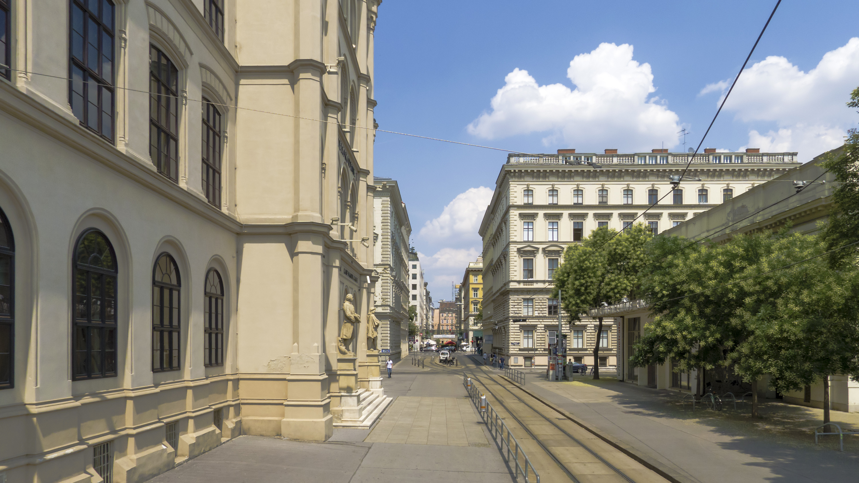 Akademiestraße in Wien 1 bei Nr. 12 Richtung Norden